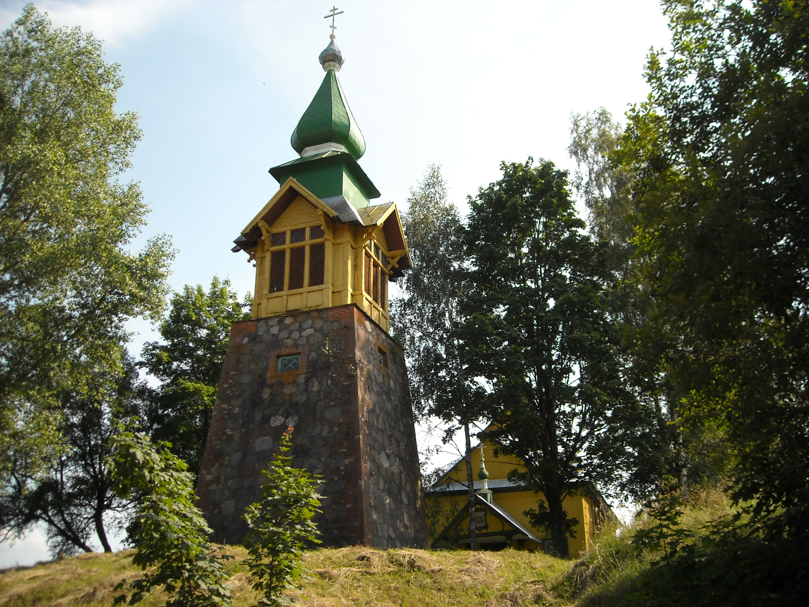 Беларуская (тарашкевіца): Царква. в. Асінагарадок This is a photo of Belarusian heritage monument. Reference number: 213Г000582 ( WLM)